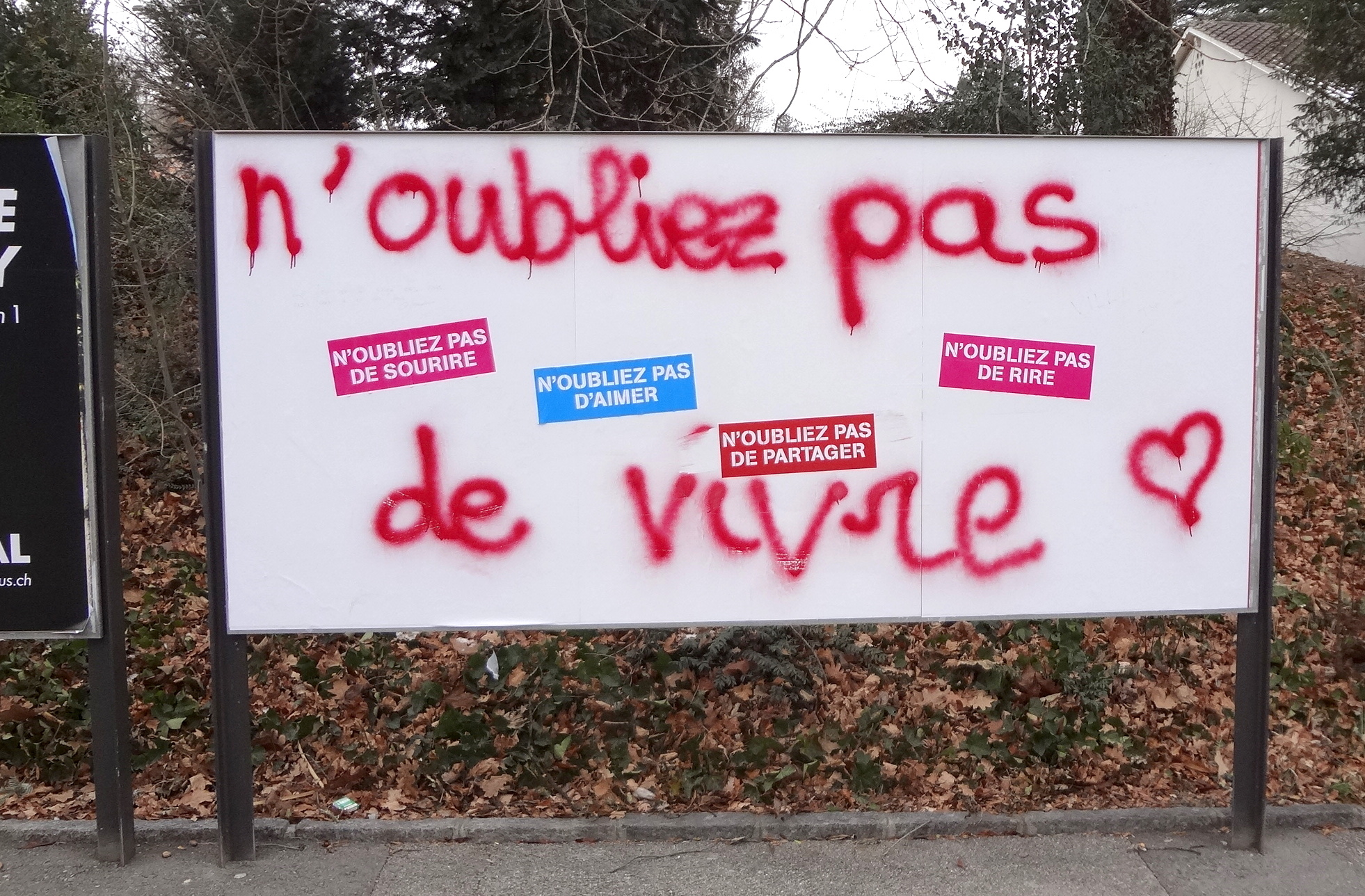 Appropriation par la population des espaces temporairement vierges des panneaux publicitaires à la suite d'un changement de concession (la société APG SGA qui a perdu le contrat au profit de Neo Advertising a recouvert les panneaux de blanc à fin décembre 2016. Rue Pestalozzi.